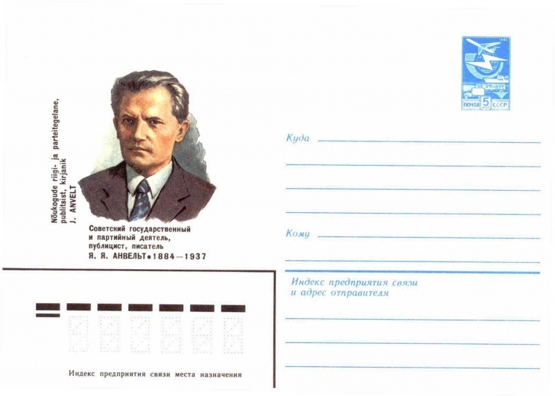 Художественные маркированные конверты 1983 года.